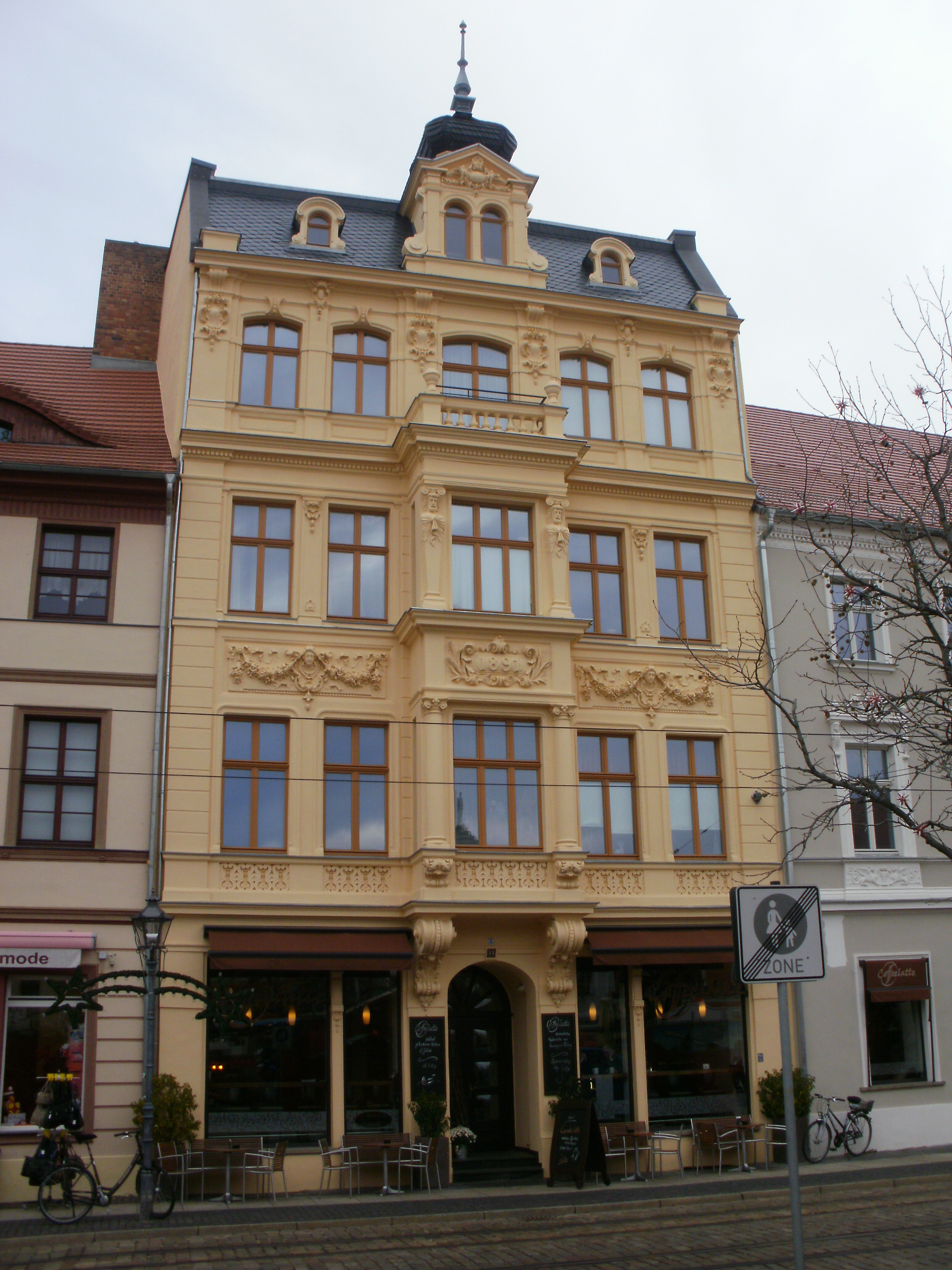 Altmarkt 13, Cottbus